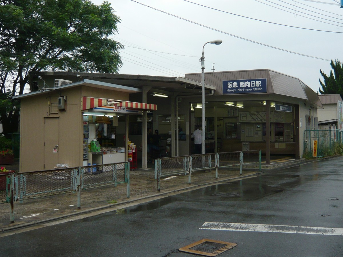 投稿者撮影（2007.08.03）